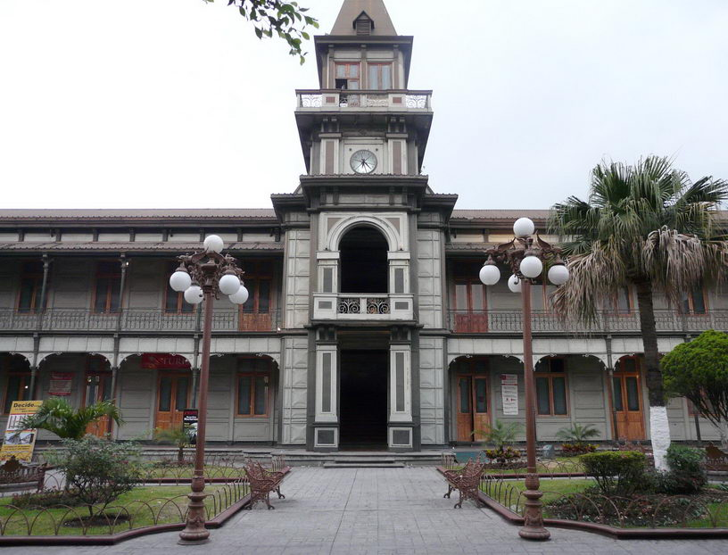 L'histoire du Palais de Fer commence en 1892, quand le maire M. Julio Vélez seconde par le Conseil municipal de l’époque a approuvé le projet de construction de cet édifice dans la ville d’Orizaba. Ce prodige architectonique a augmente le prestige de la ville qui était un point de passage obligatoire dans le trajet Mexico-Veracruz. PALAIS DE FER Le maire a ordonné à la conception du Palais dans les ateliers de la Société Anonyme des Forges Aiseau, en Belgique, au prix de 100 000 pesos en or. Le Palais est construit presque entièrement du film, avec des poteaux de fer, les portes sont en bois et les ornements en fer moulé. Le bâtiment a été construit par les travailleurs mexicains conduits et guidés par des ingénieurs européens spécialisés. Le Palais de Fer est aussi un exemple de l'influence de l’architecture européenne dans cette ville, autrement connue comme "Le Manchester du Mexique". La structure de l’édifice, totalement démontable, a été construite avec les pièces expédiées en bateau de Bruxelles. Les trois bateaux a vapeur qui ont transporte la charge, Haver, Paris et Vala sont arrives au port de Veracruz. Ils ont charge un total d'environ 600 tonnes. Le Palais, éclairé par d'innombrables lampes à huile, a ouvert ses portes le 15 Septembre 1894 en présence de tous les habitants d’Orizaba. L’édifice est compose de deux étages et a une surface de 180 mètres carrés. Il a fonctionné comme Hôtel de ville depuis son inauguration et jusqu’au 1991. Actuellement, il abrite le musée pré-hispanique, une salle de conférence, un atelier de peinture, le musée de la bière, un café, une bibliothèque, et le Bureau de coordination du truisme municipal.